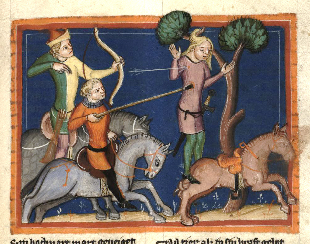 Rudolf von Ems: Weltchronik. Böhmen (Prag), 3. Viertel 14. Jahrhundert. Hochschul- und Landesbibliothek Fulda, Aa 88. Bildbeschreibung nach Martin Roland. Miniatur 174 286r Abschaloms Tod